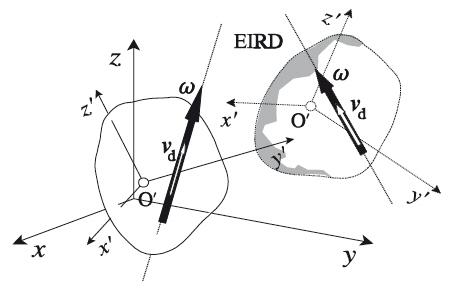 Cinemática del Sólido Rígido